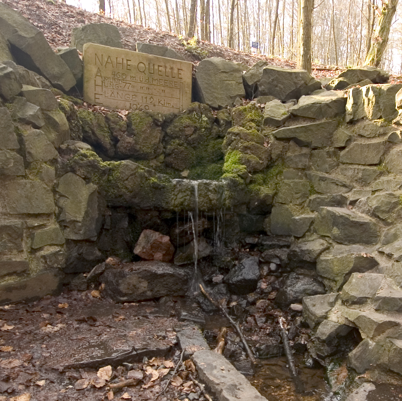 Nahequelle im Frühjahr 2007